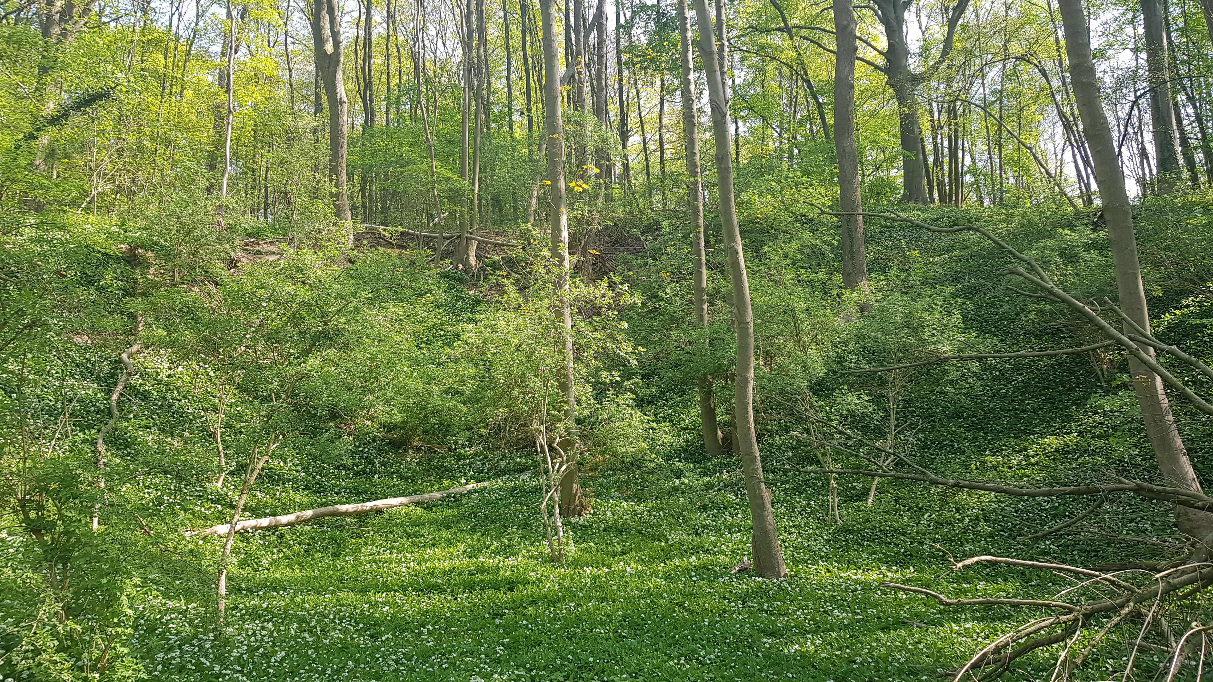 Groeve de Groete Erd in het Savelsbos, Gronsveld, Nederland